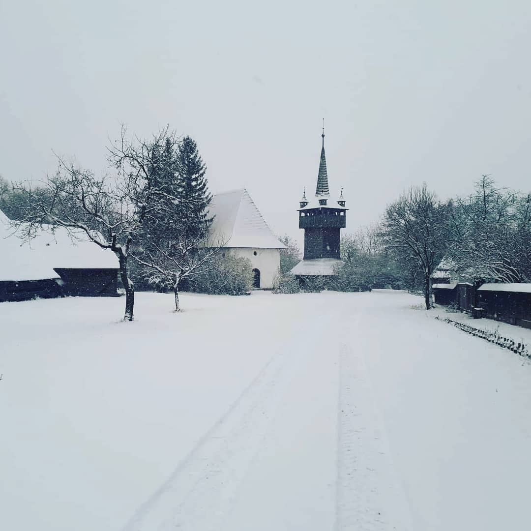 Szentendrei Skanzen, Felső-Tiszavidék télen